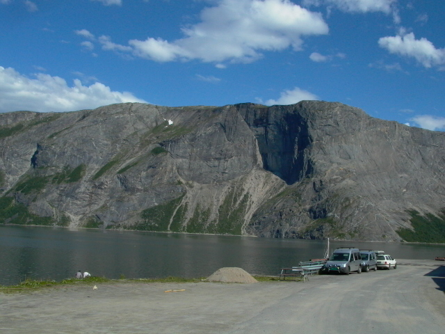 Seglfjellet i Beiarn i Nordland, 650 m.o.h., sett fra sør ved Tvervik